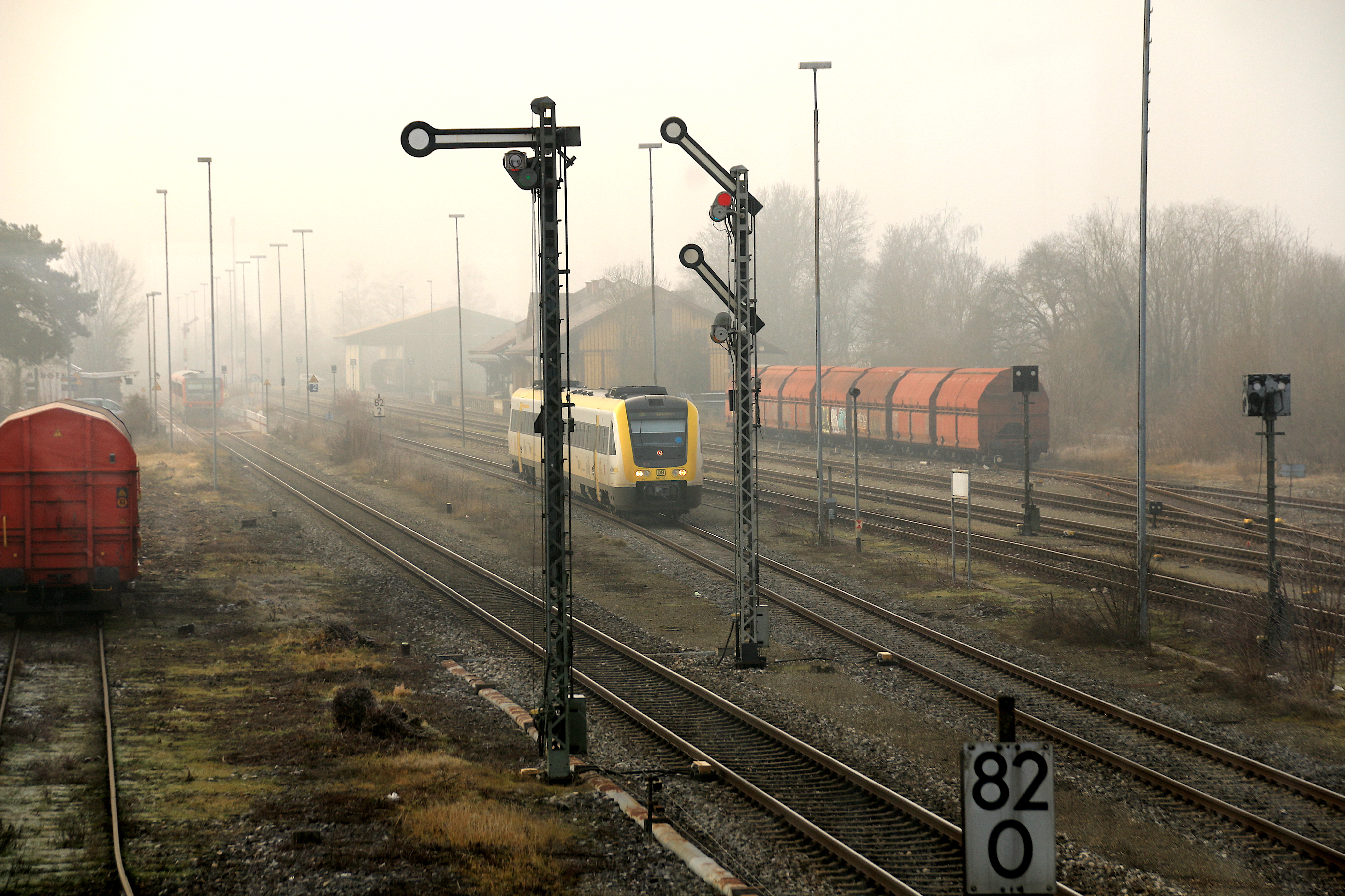 Bahnhof Mengen (2020)